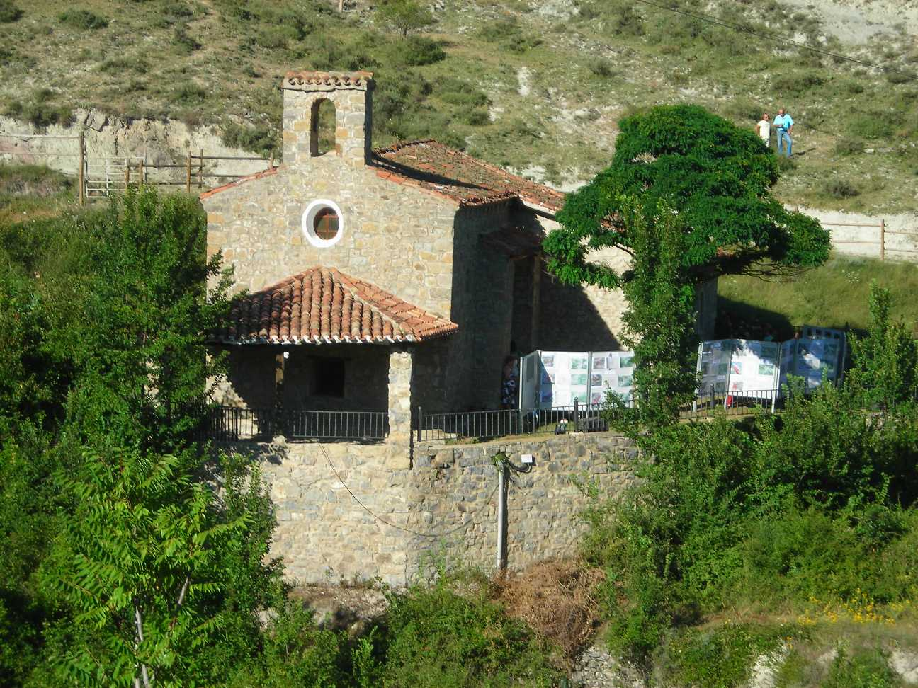 Ermita de El Collado con exposición fotográfica el Día del Camero Viejo en Terroba (La Rioja)